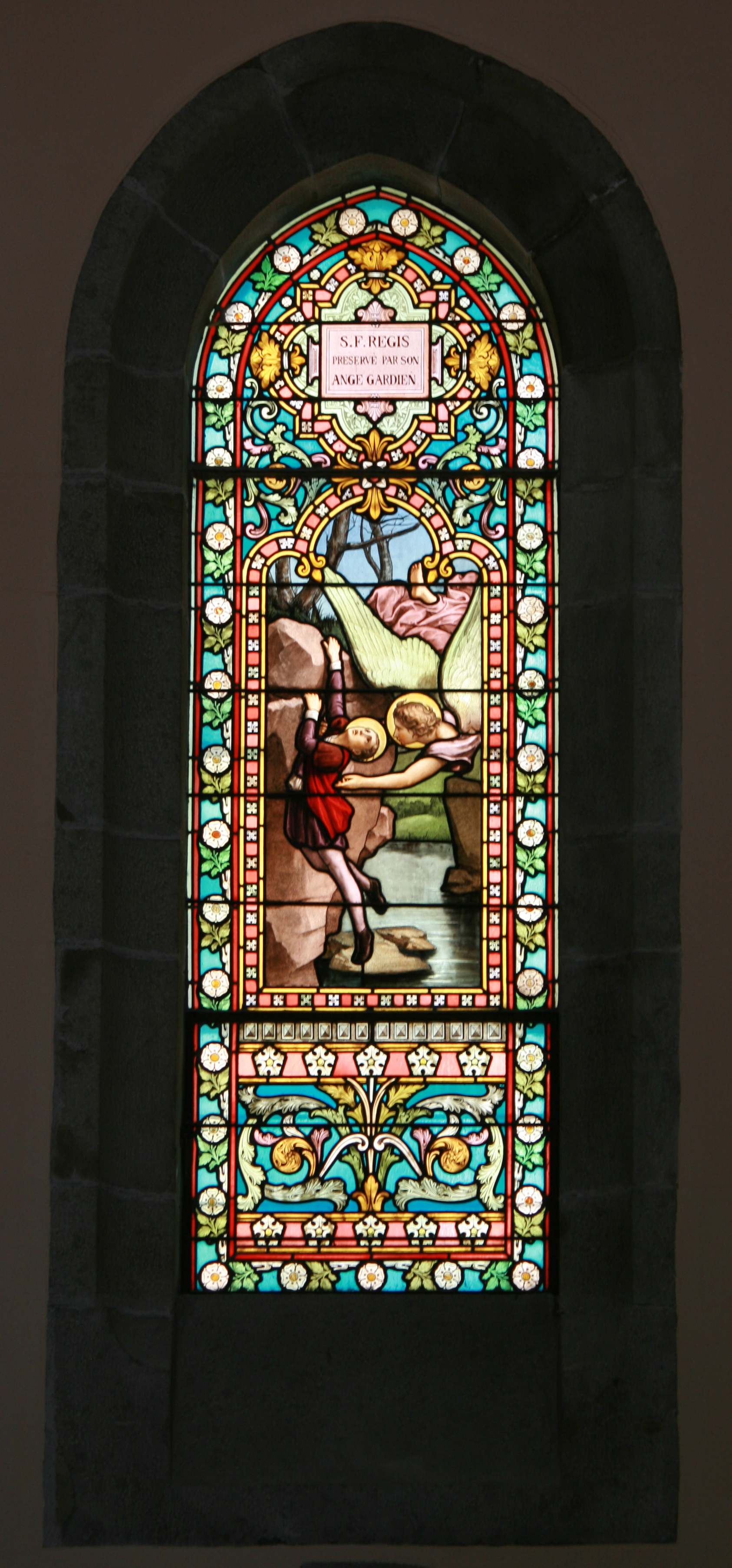 Un des vitraux de la basilique saint Régis de Lalouvesc